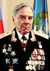 Владимир Николаевич Лобов (род. 1935) — советский военачальник, генерал армии